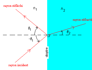 Schéma dioptre et rayons (schéma personnel) Catégorie:Schéma de physique